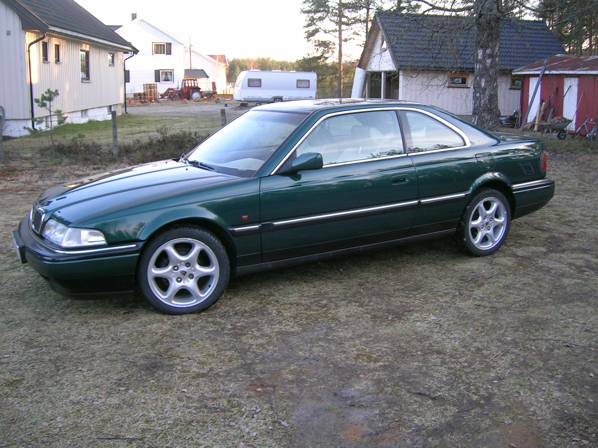 1993 rover 827 coupe